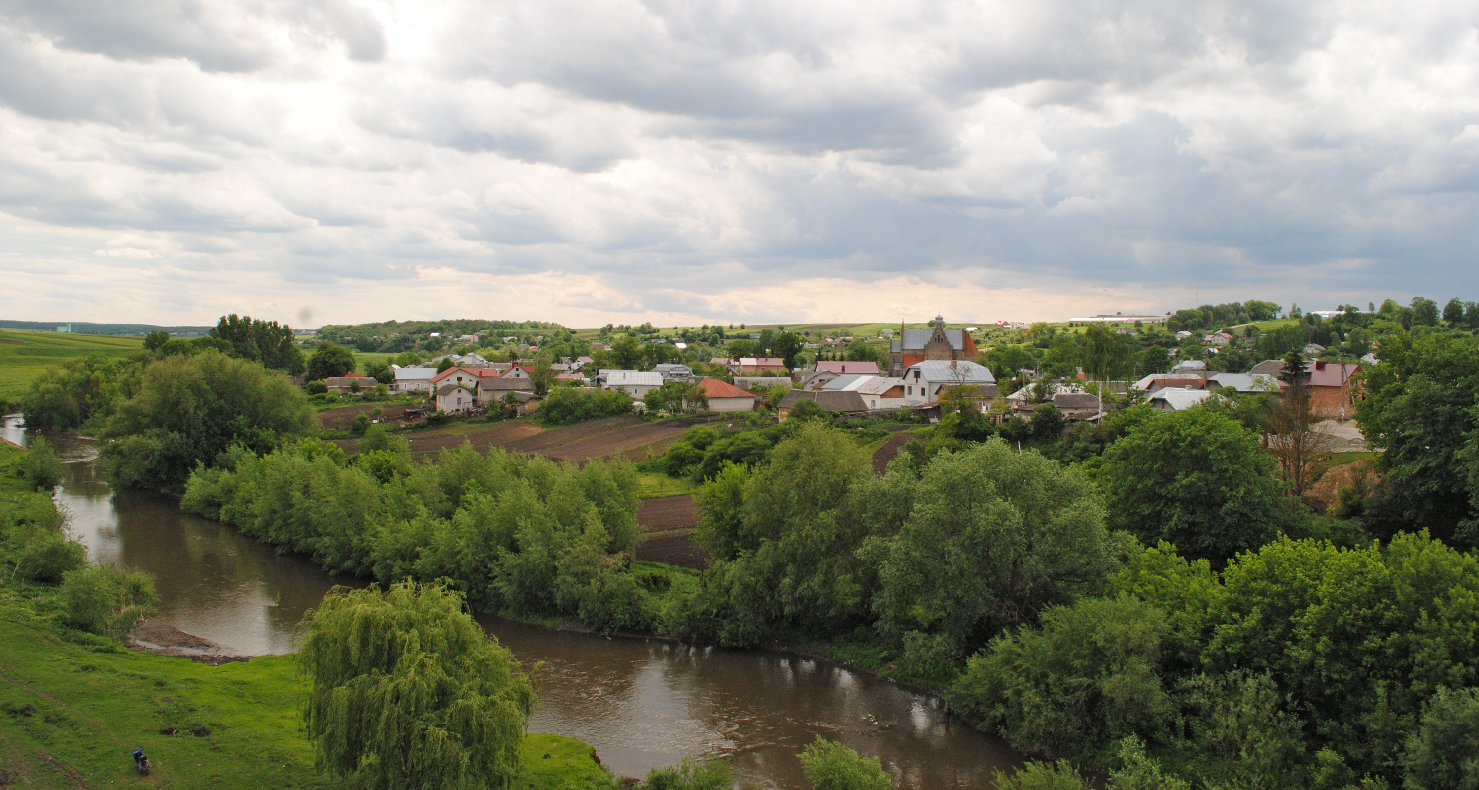 Вигляд на село Буцнів Тернопільського району Тернопільської області із залізничного моста. Внизу протікає річка Серет.